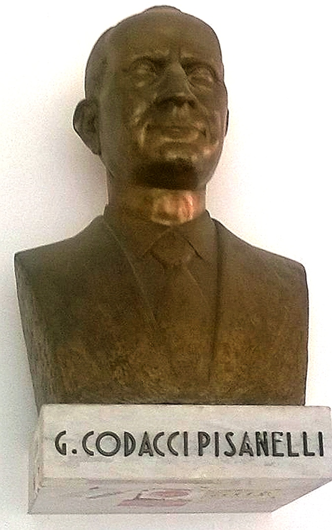 Statua di Codacci Pisanelli